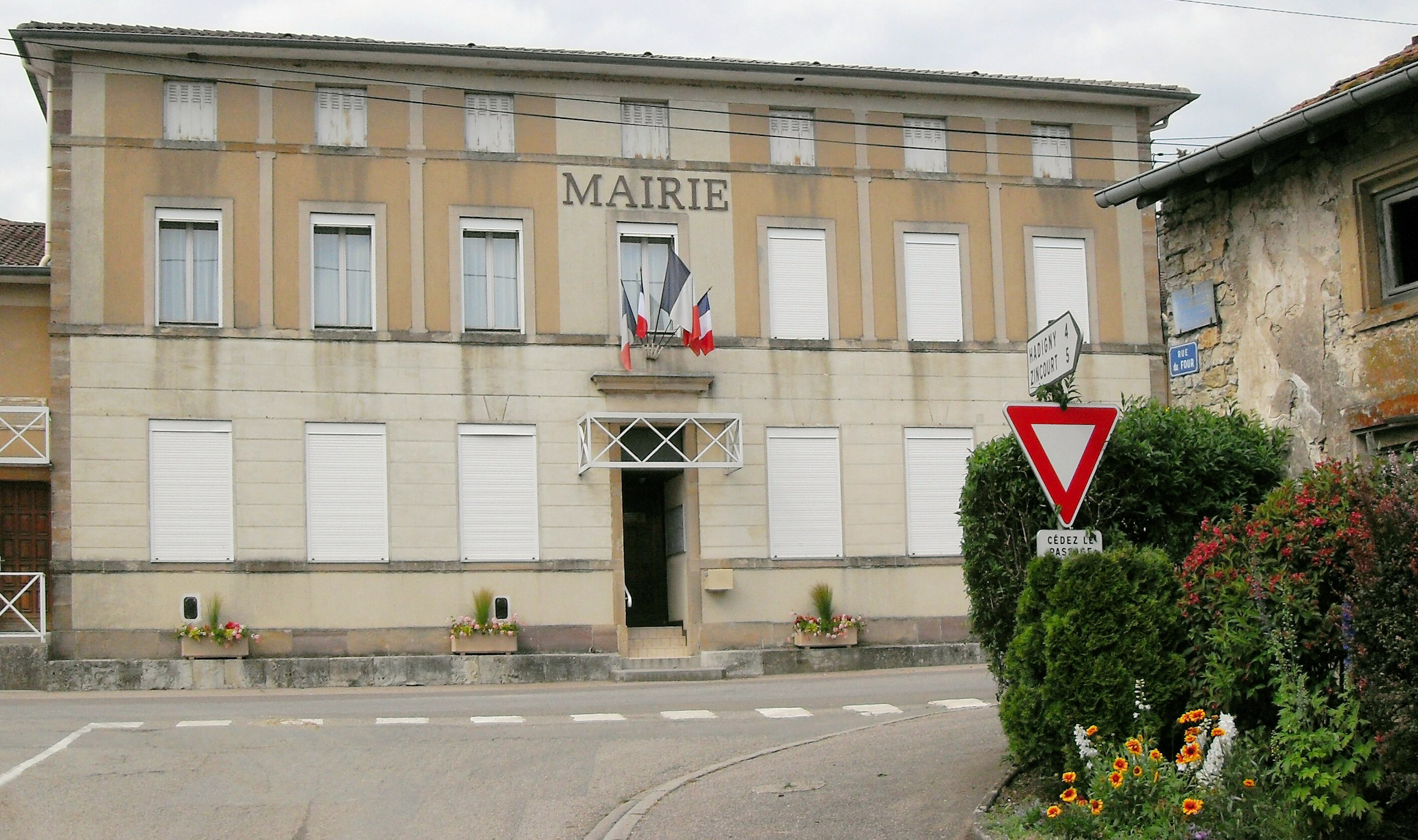 La mairie de Moriville